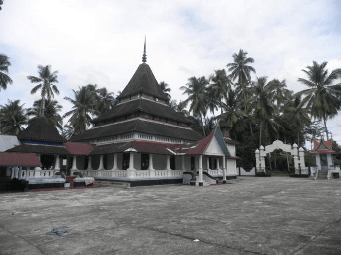 Masjid Ampek Lingkuang